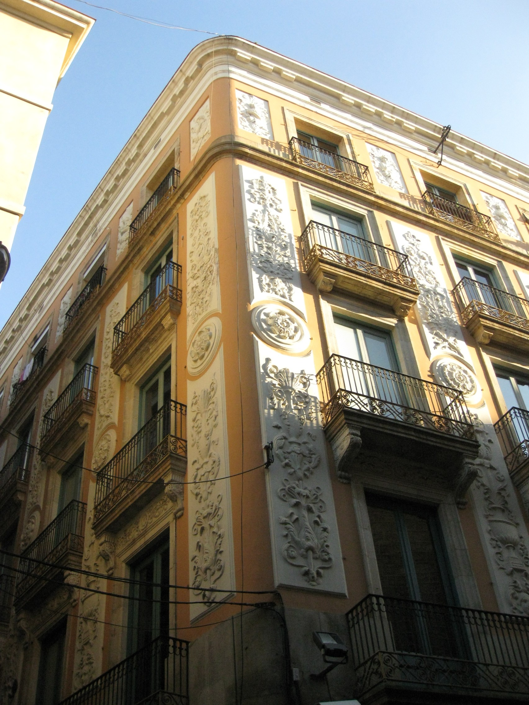 Casa Gené (Josep Fontserè i Domènech, 1848), al carrer de l'Hospital cantonada amb Robador, al Raval de Barcelona